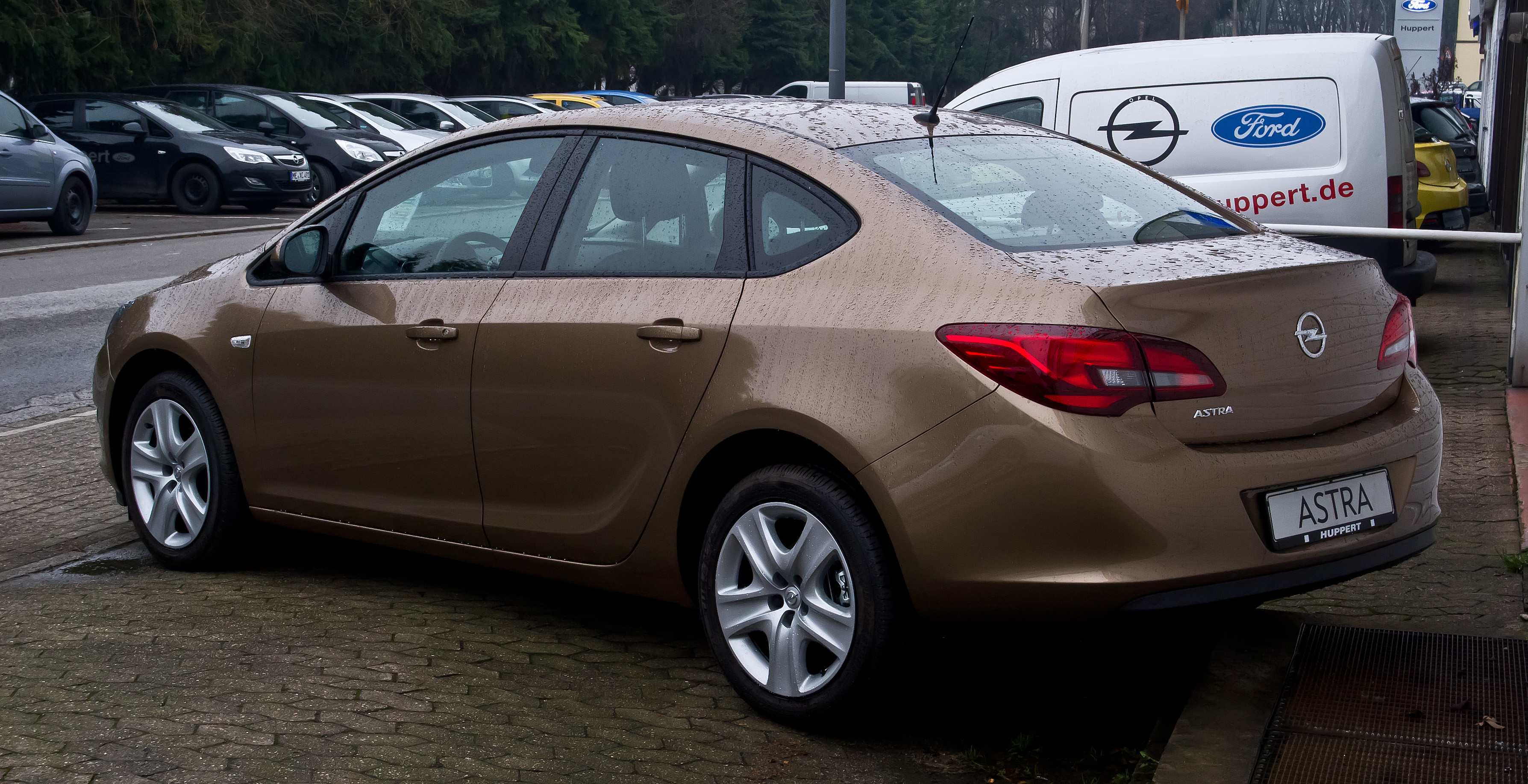 Opel Astra Stufenheck 1.6 Edition (J, Facelift)